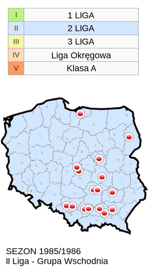 Jagiellonia w sezonie 1985/86 mapa